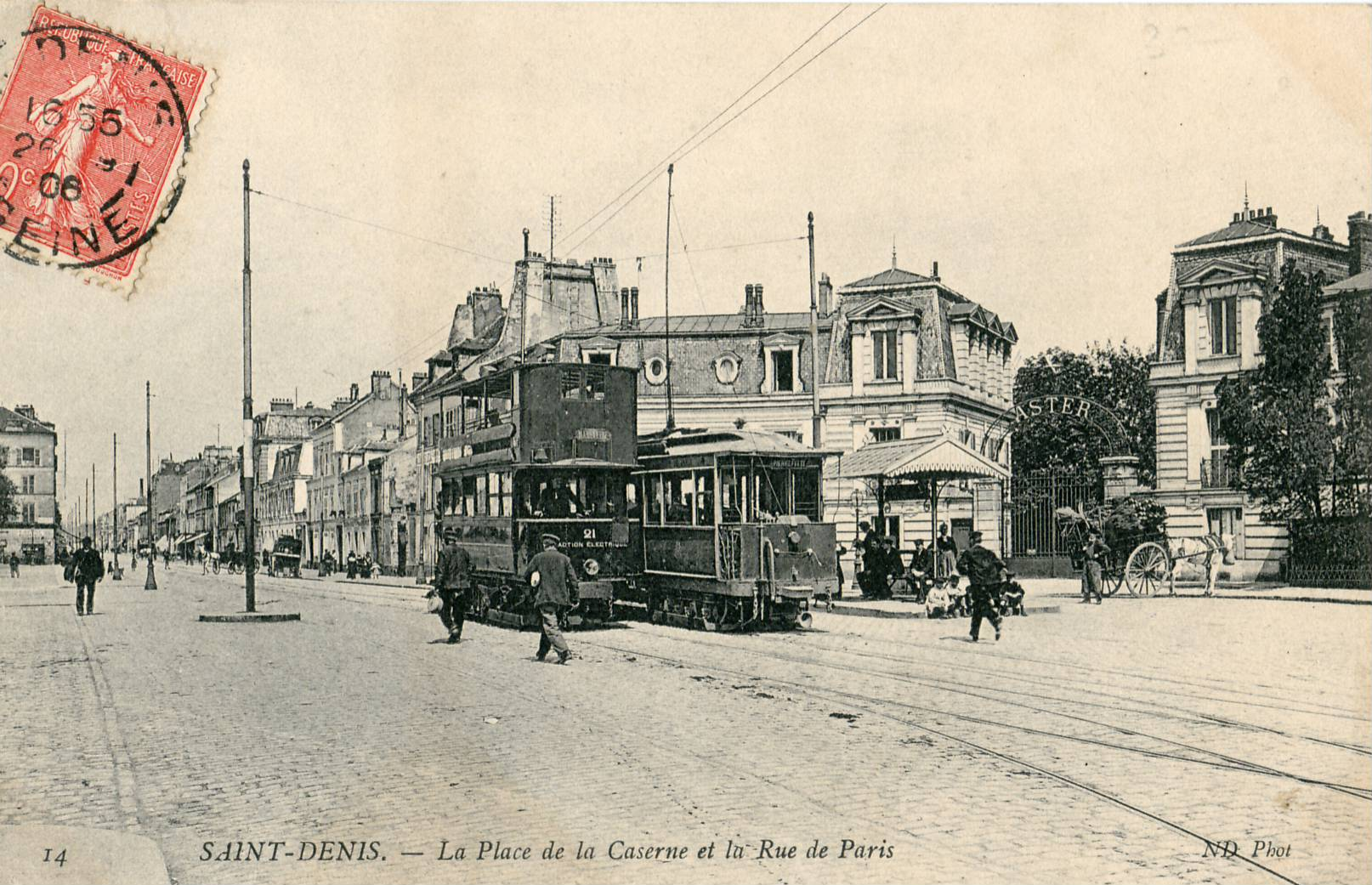 Carte postale ancienne éditée par ND, n°14 :SAINT-DENIS - La Place de la Caserne et la Rue de ParisNOTA : A cet endroit se trouve depuis juillet 2013 le terminus de la ligne T5 du tramway d'Île-de-France